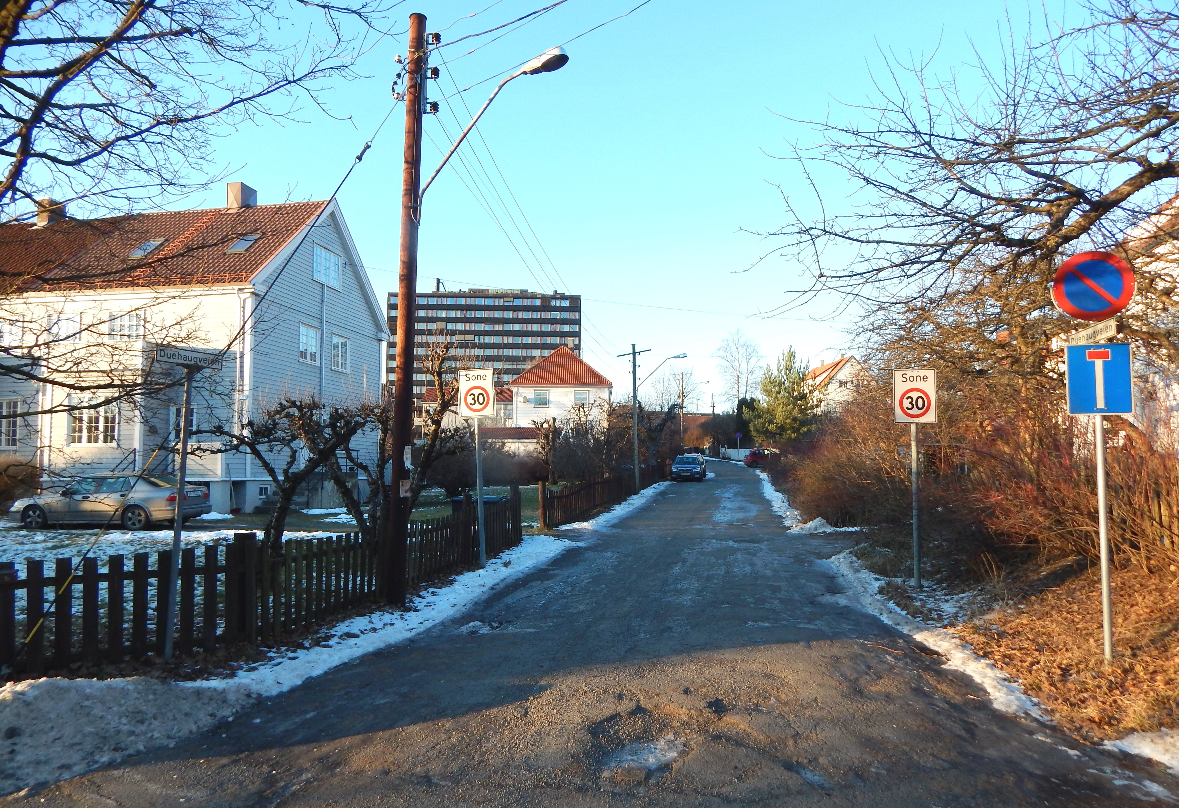 Duehaugveien sett fra Prestegårdsveien